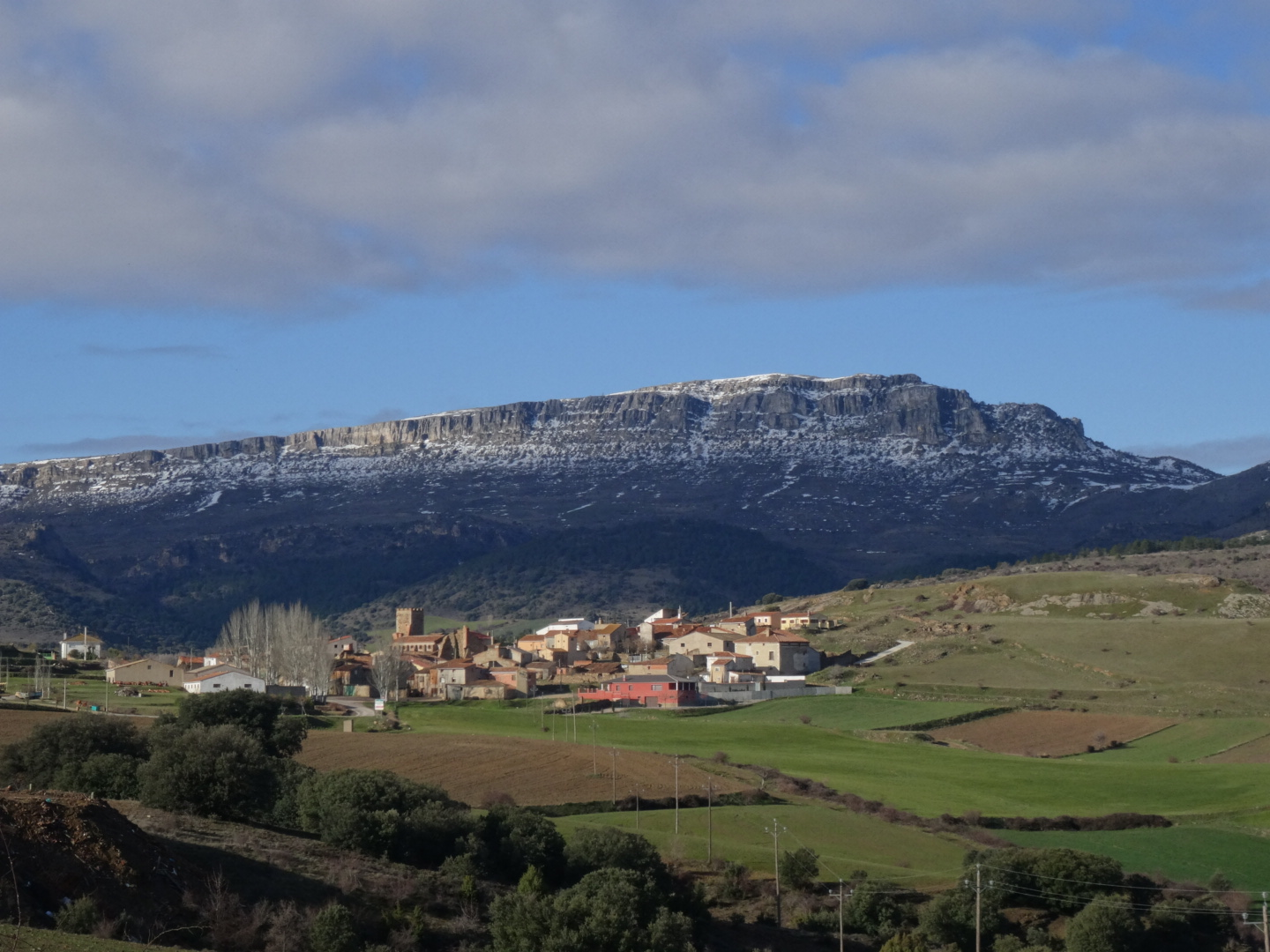 Vista de Bádenas con la sierra de Cucalón al fondo - 4